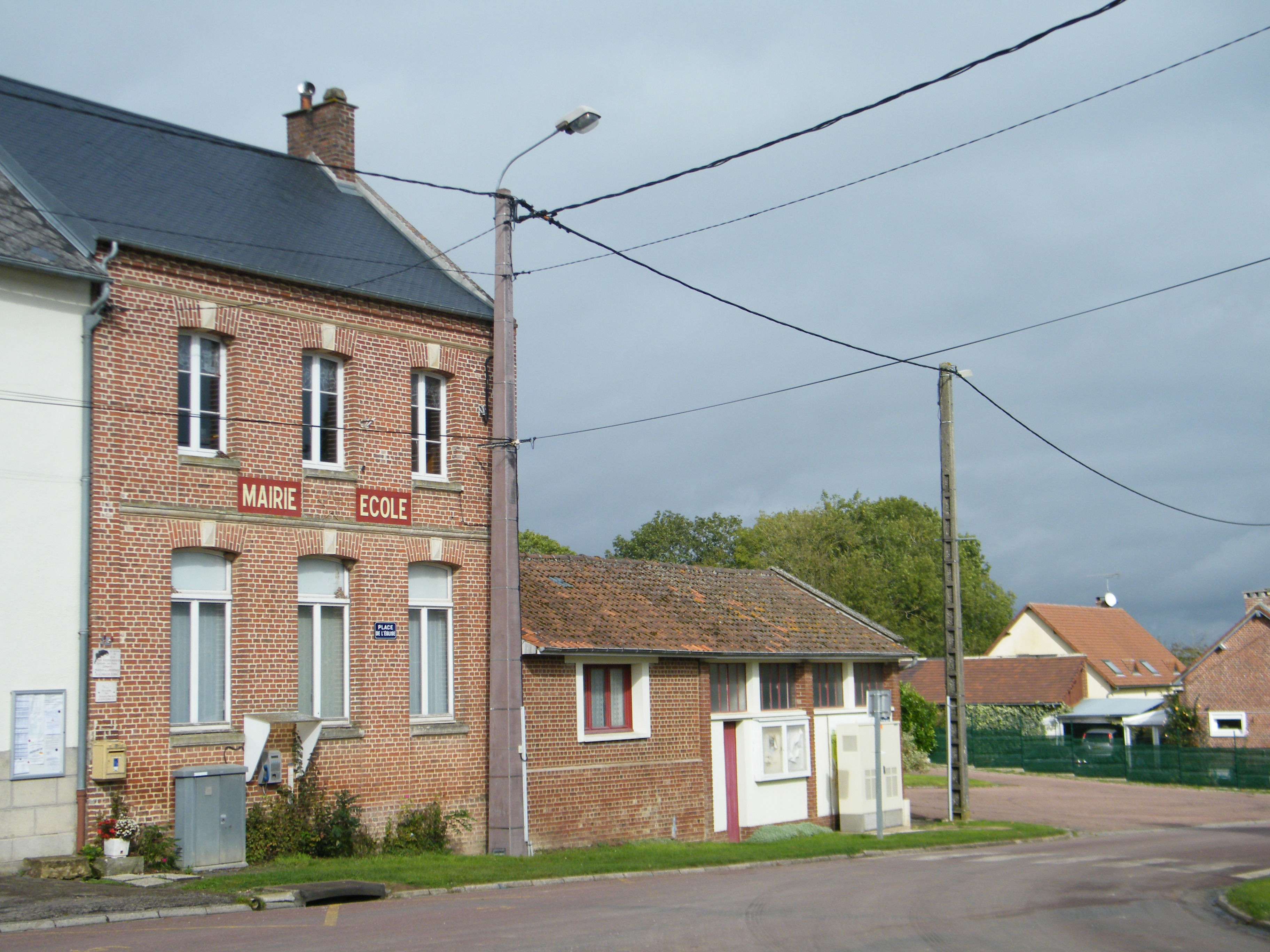 Mairie.